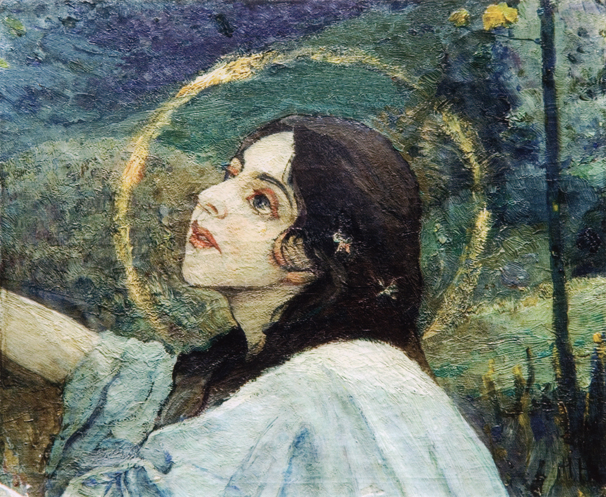 Голова великомученицы Варвары. 1895-1897; 1924 Фрагмент картины "Чудо", уничтоженной автором в 1931 г. Холст, масло. 43 x 48 см Частное собрание